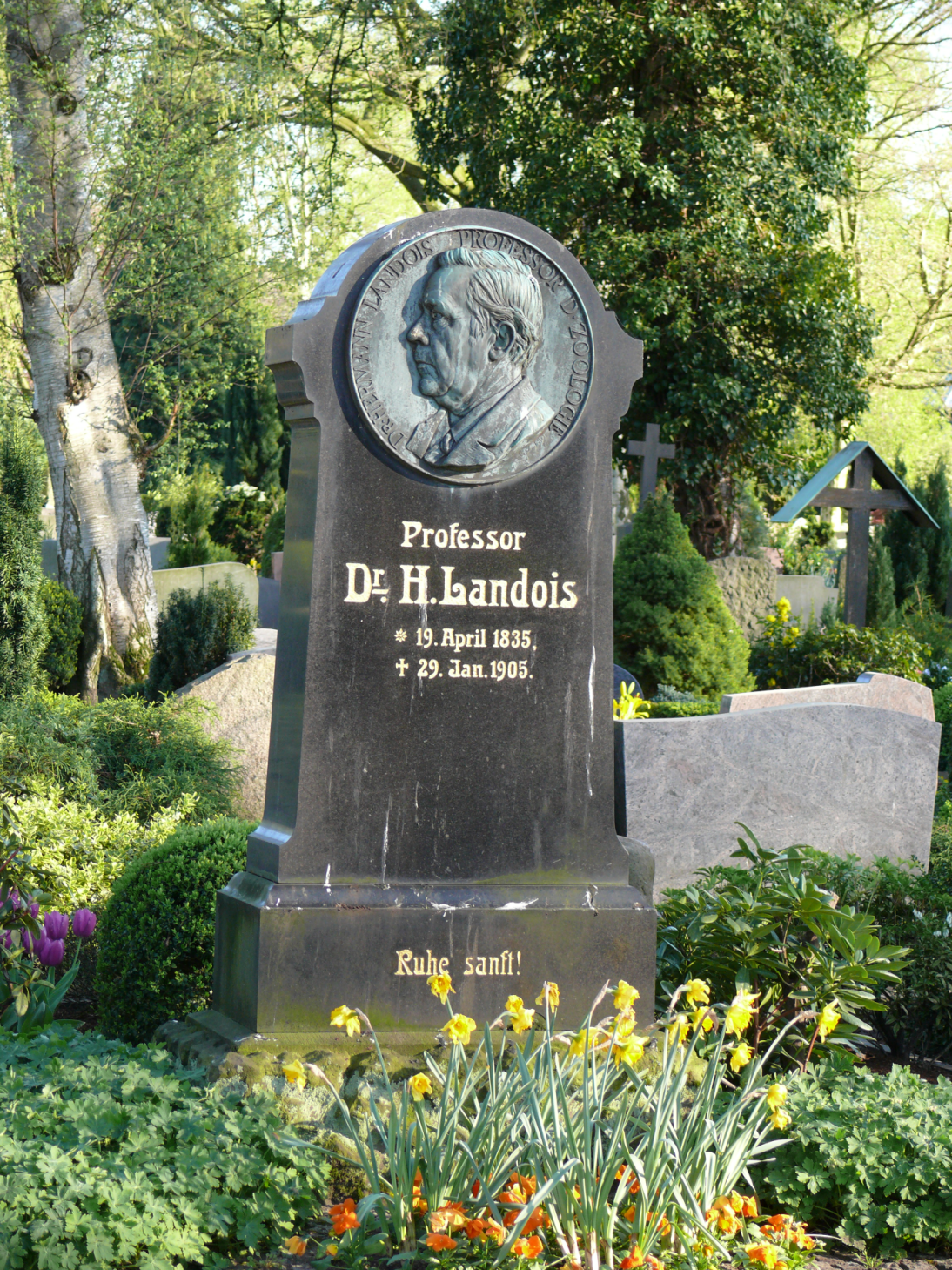 Grabstätte von Prof. Landois auf dem Zentralfriedhof